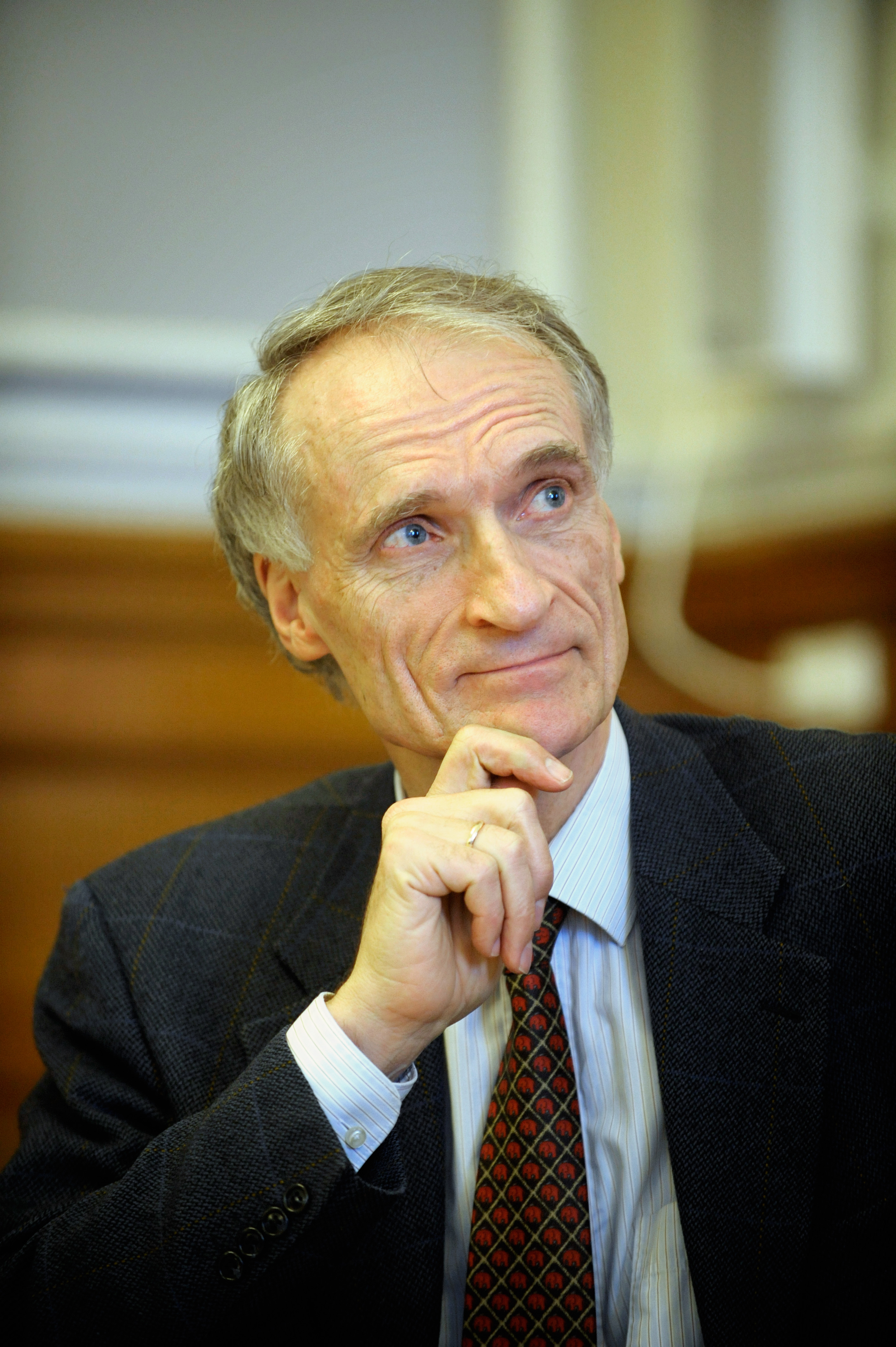 Bertel Haarder, undervisnings- och samarbetsminister Danmark